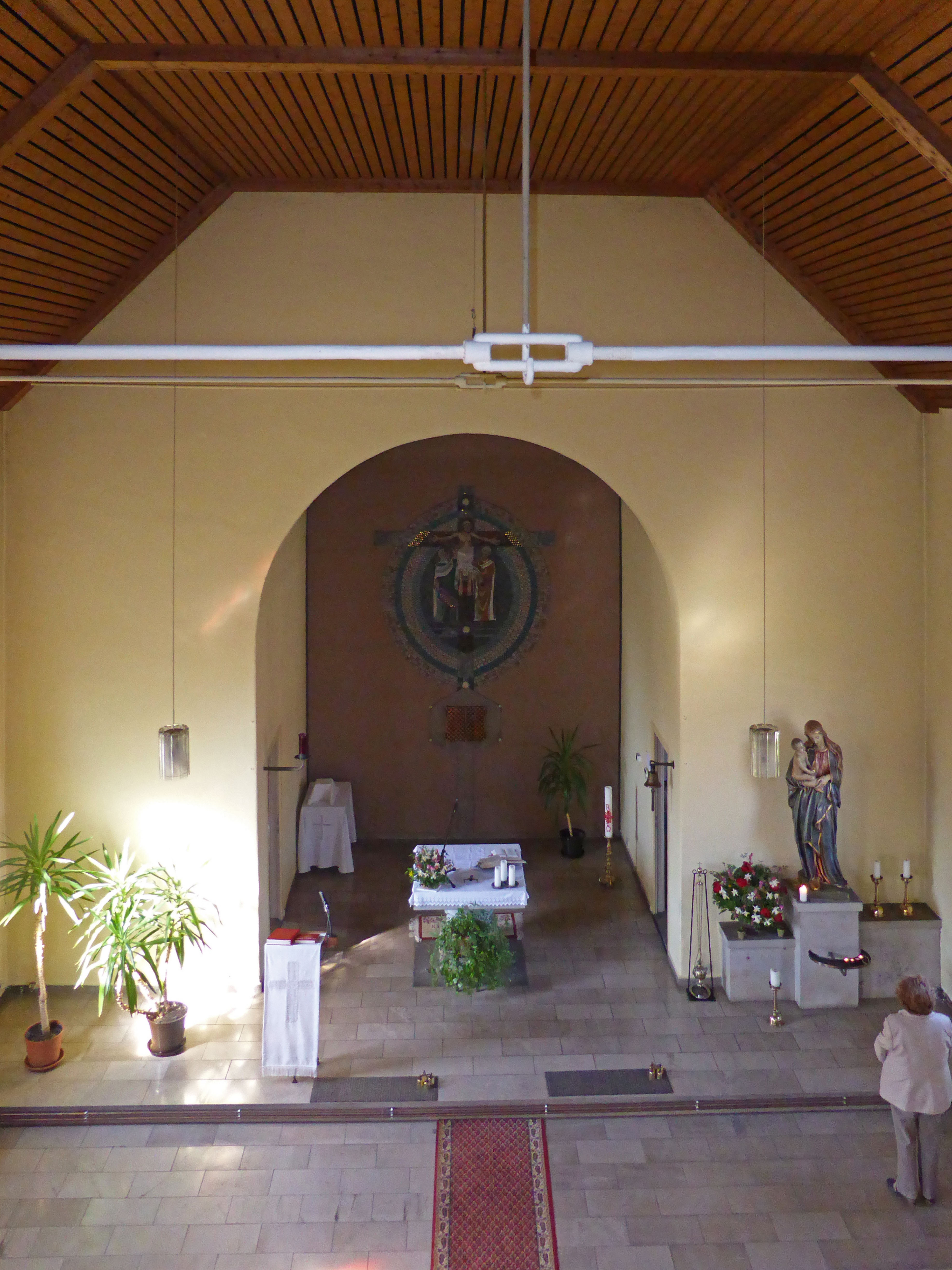 Katholische St.-Joseph-Kirche in Wolsdorf (Landkreis Helmstedt).